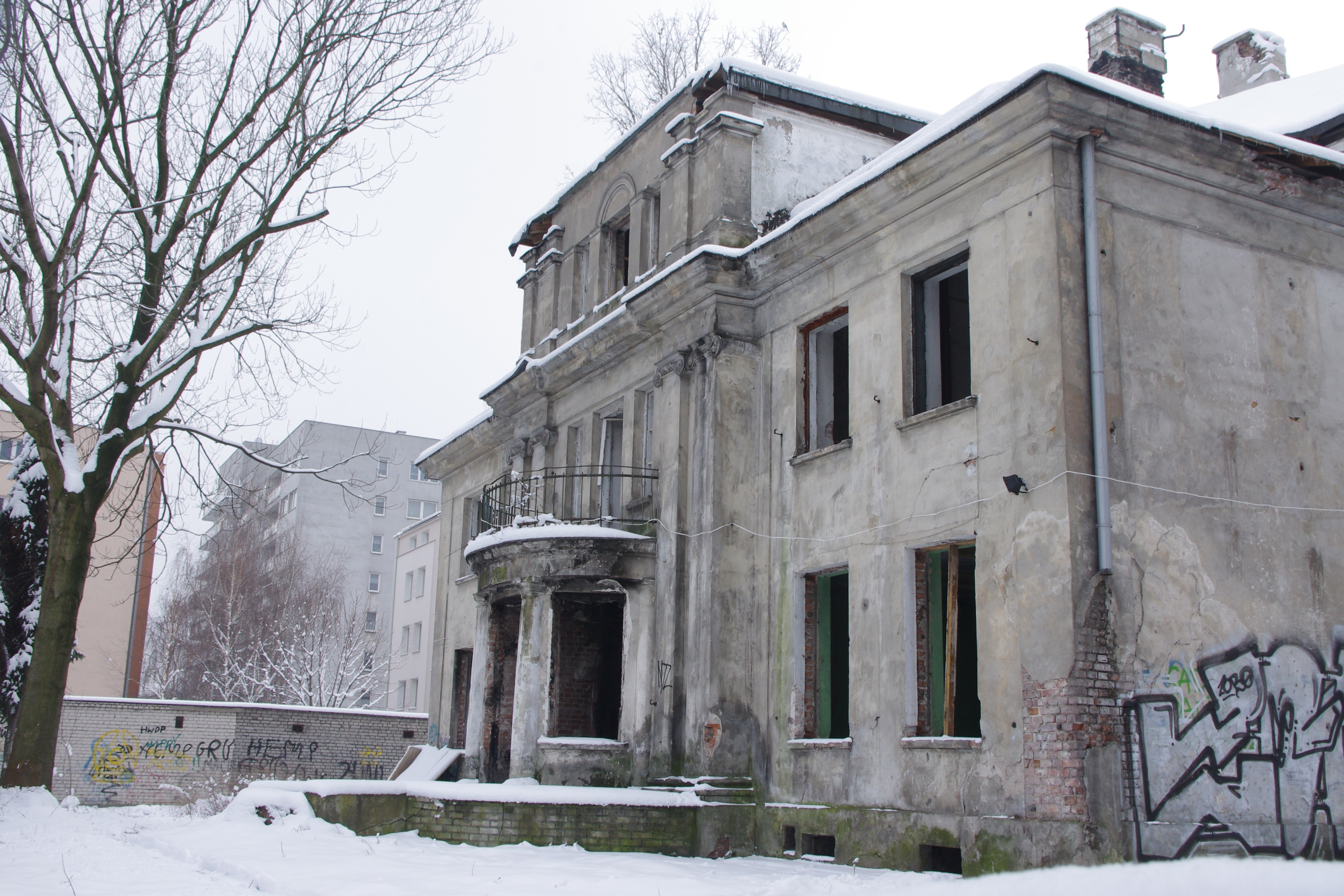 Willa przemysłowca kuśnierskiego Arpada Chowańczaka (Arpad Chowańczak) przy ul. Morskie Oko 5 w Warszawie – powstała w 1928 r., położona na warszawskim Starym Mokotowie. Od 2010 r., w rejestrze zabytków.